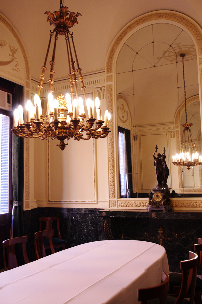 Club de La Unión This is a photo of a national monument in Chile: 1637